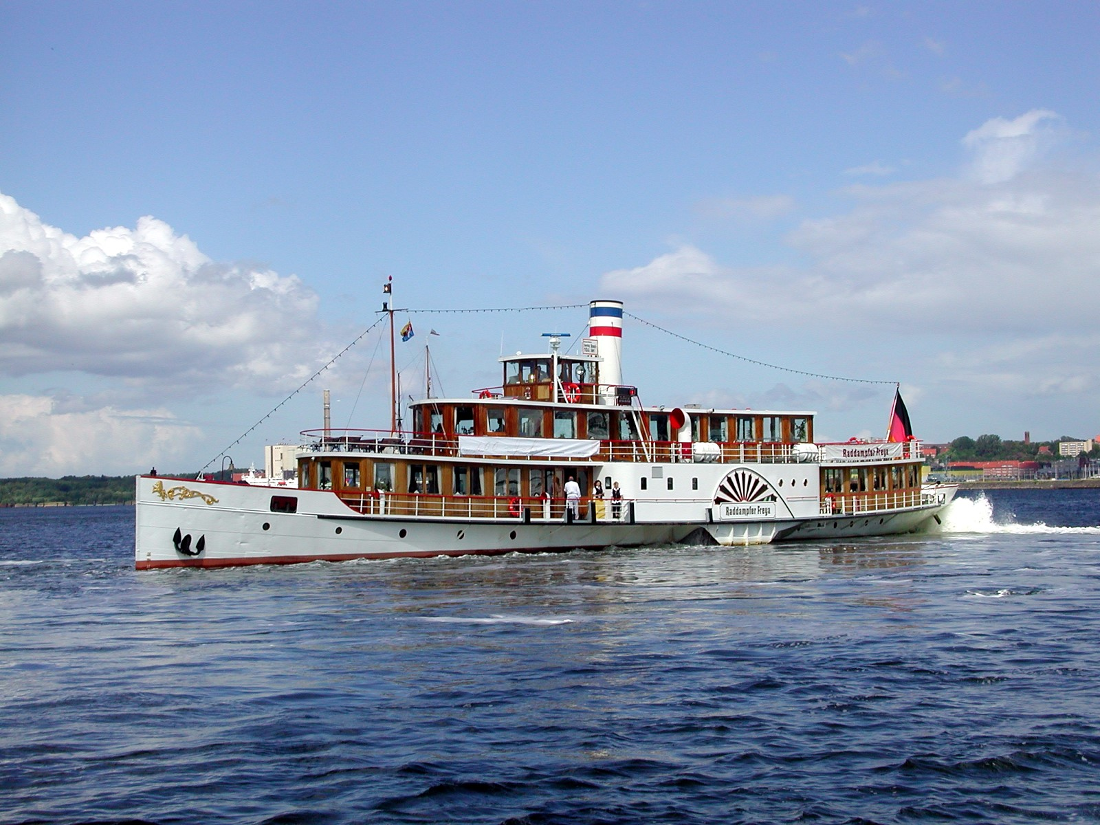 Der Raddampfer Freya auf der Kieler Förde. Stapellauf am 21. April 1905 als "Westerschelde" bei der Schiffswerft J.&K. Smid in Kinderdijk. Seit 1999 trägt das Schiff den Namen Freya.